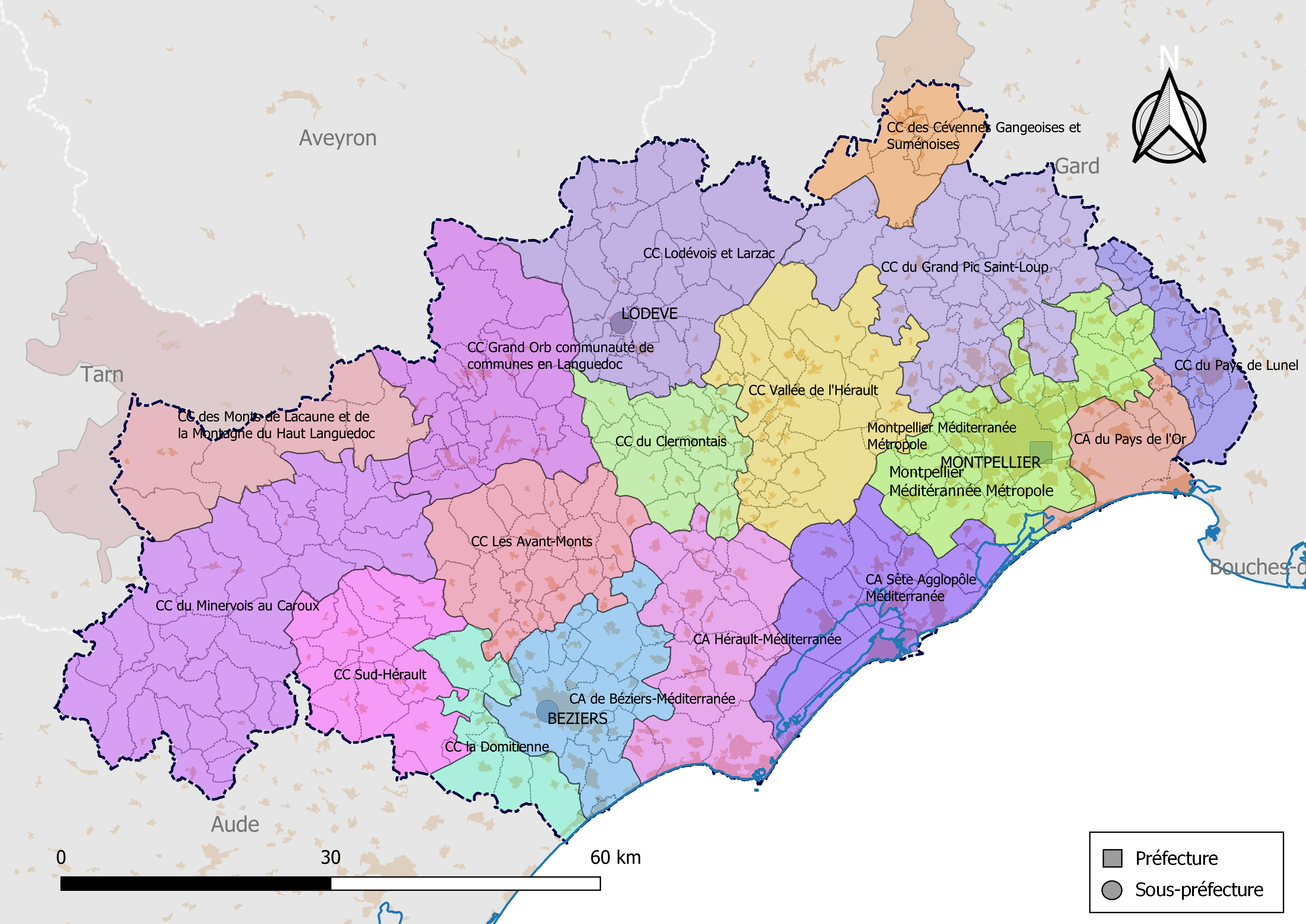 Carte des intercommunalités du département de l'Hérault, France. Composition au 1er janvier 2019.